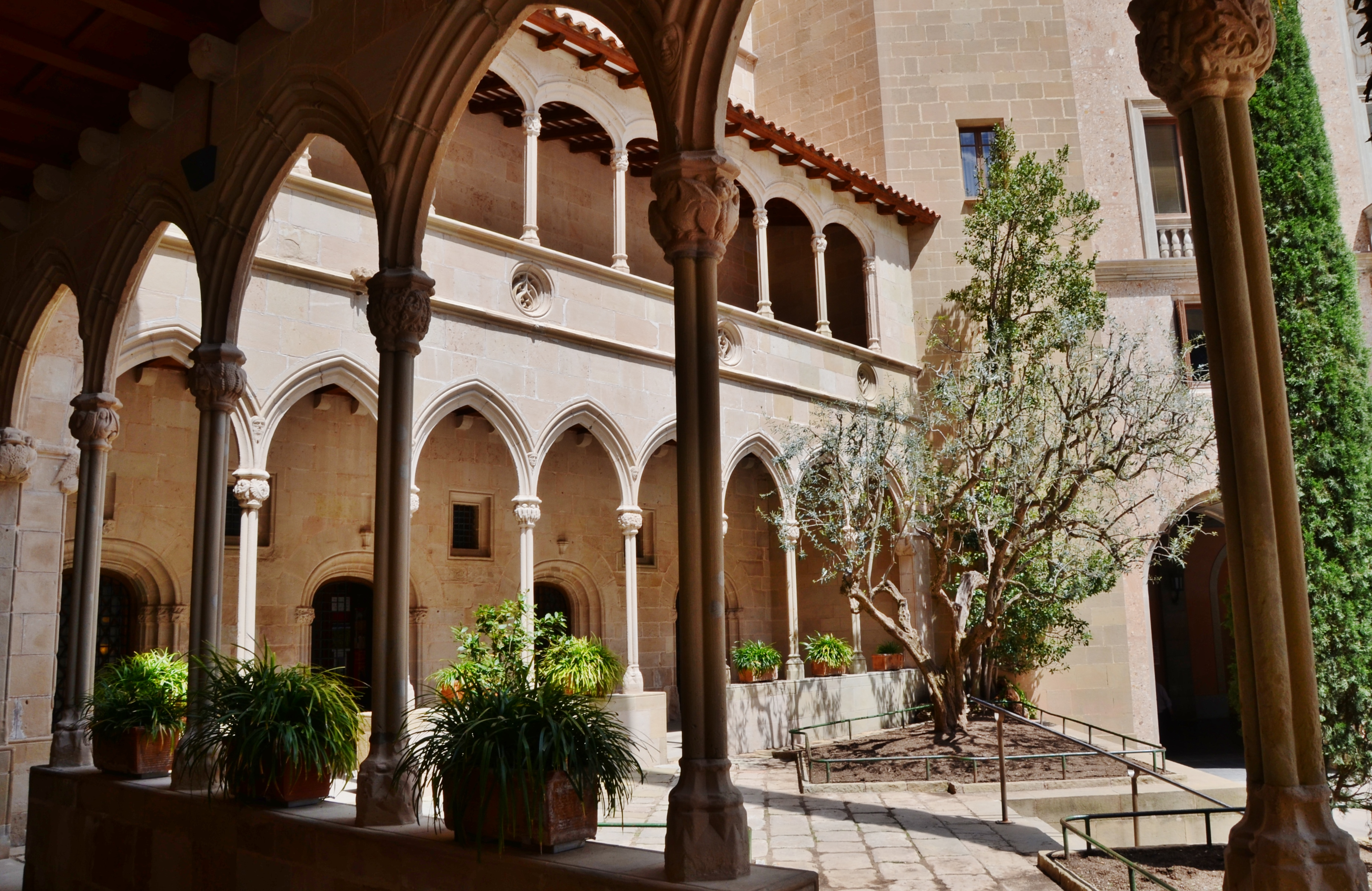 Monestir de Santa Maria de Montserrat (Monistrol de Montserrat)